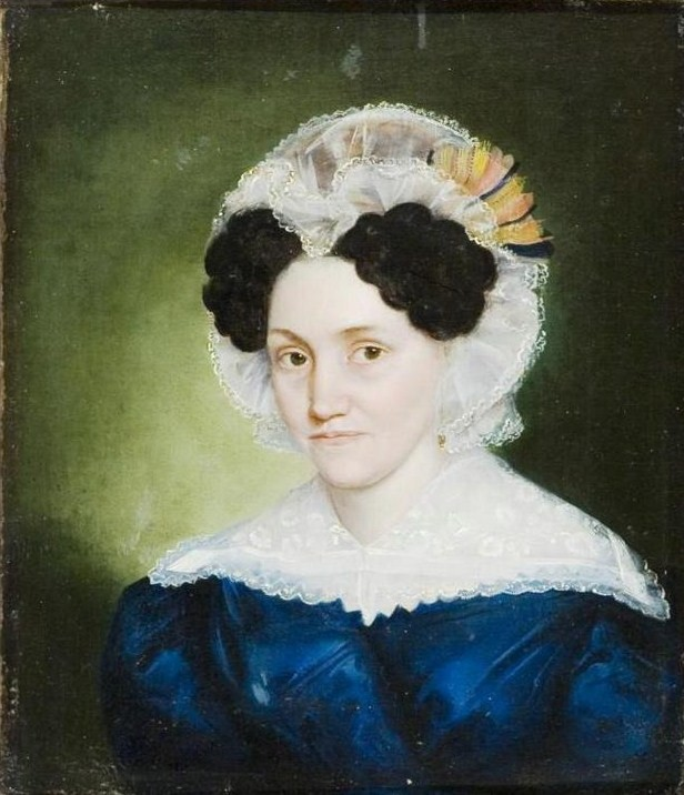 Анна Андреевна Блудова, ур. Щербатова (1777-1848)